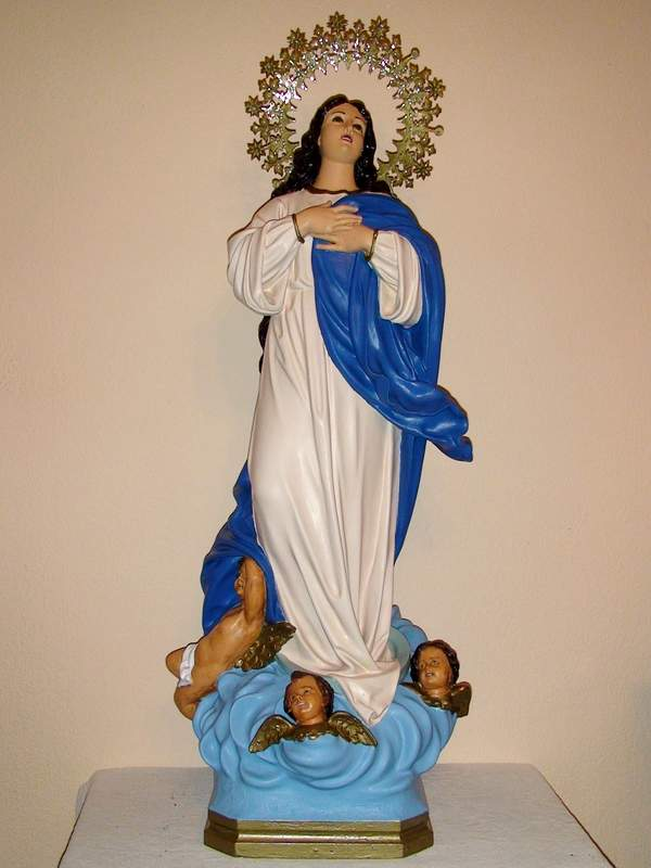 Talla de la Virgen Inmaculada de la Capilla Castrense de la Purísima Concepción. Melilla. Restaurada por Francisco Ruiz Peinado.